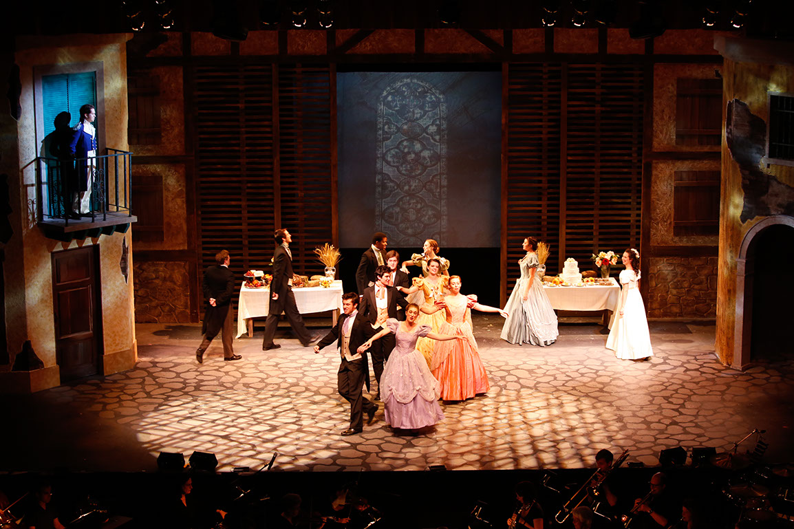 Les Miserables